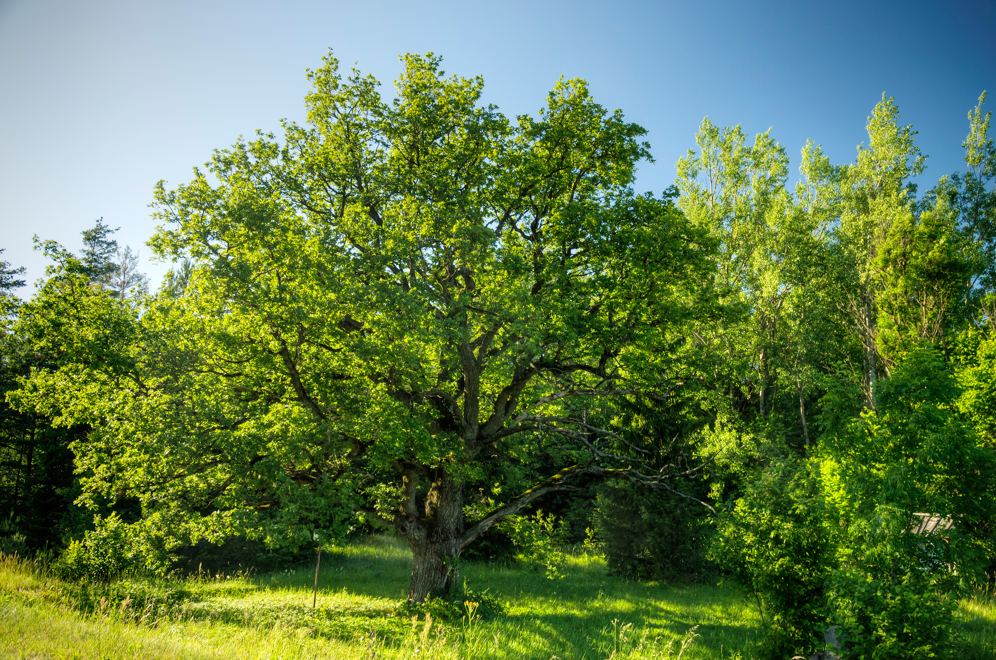 Panga tamm Läänemaal Karinõmme külas, Lihula-Pärnu maantee ääres. Kaitstav loodusmälestis KLO4000396.